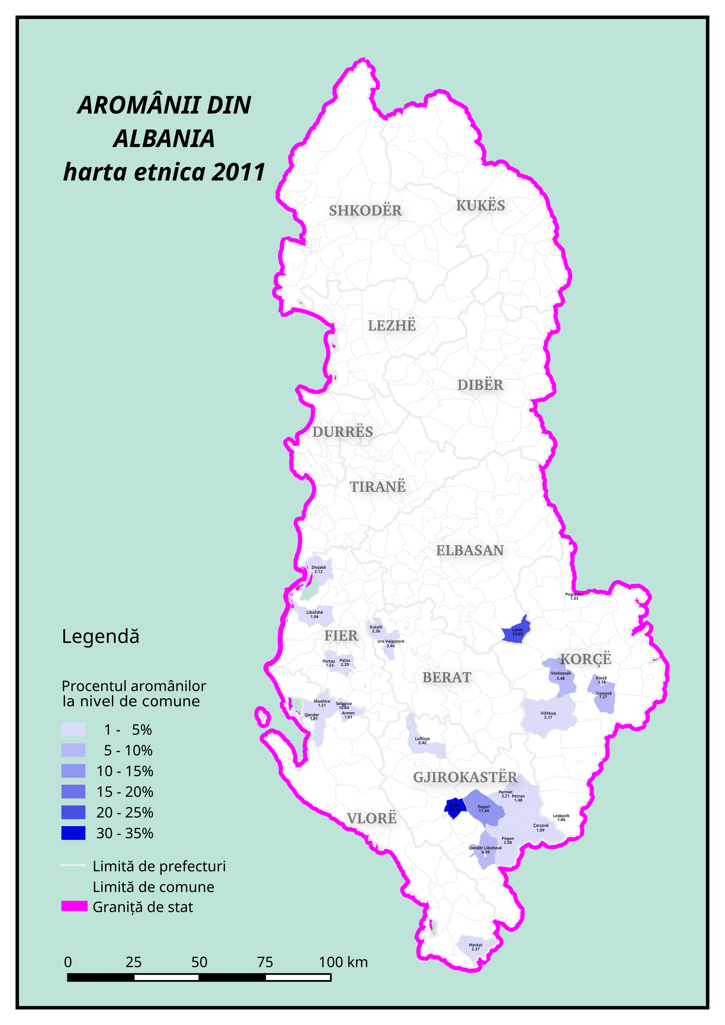 Aromanii din Albania după datele oficiale ale recensământului populației din 2011